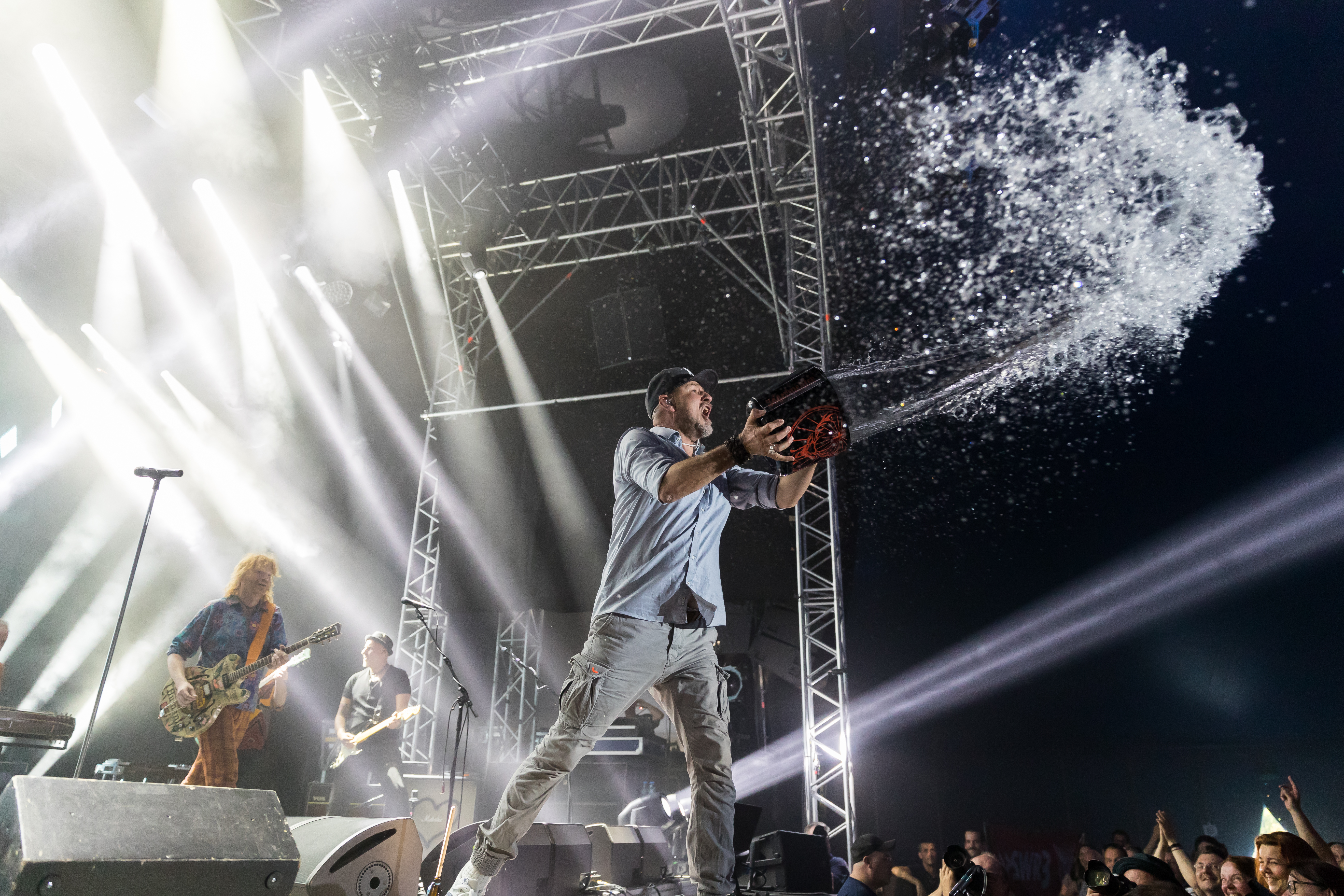 Fury in the Slaughterhouse during Zeltfestival Rhein-Neckar at Maimarkt, Mannheim, Baden-Württemberg, Germany on 2017-06-14, Photo: Sven Mandel